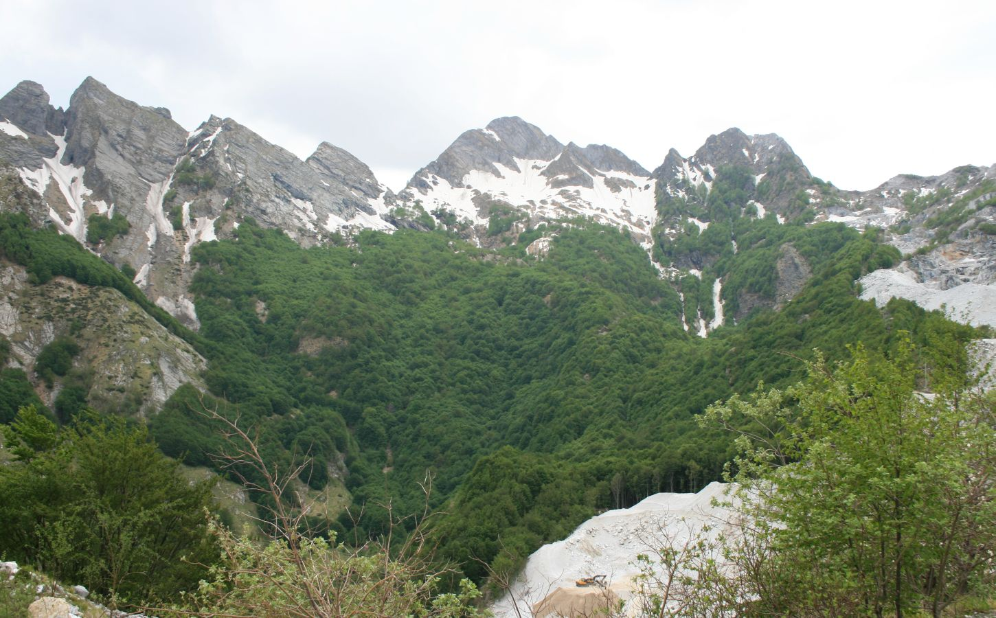 Italien/Italia/Italy: Toscana, Prov. Lucca, Parco Regionale delle Alpi Apuane, Orto di Donna, Pizzo Maggiore (1794 m), Pizzo Altare (1747 m), Monte Cavallo (1889 m), Monte Contrario (1789 m), von NW